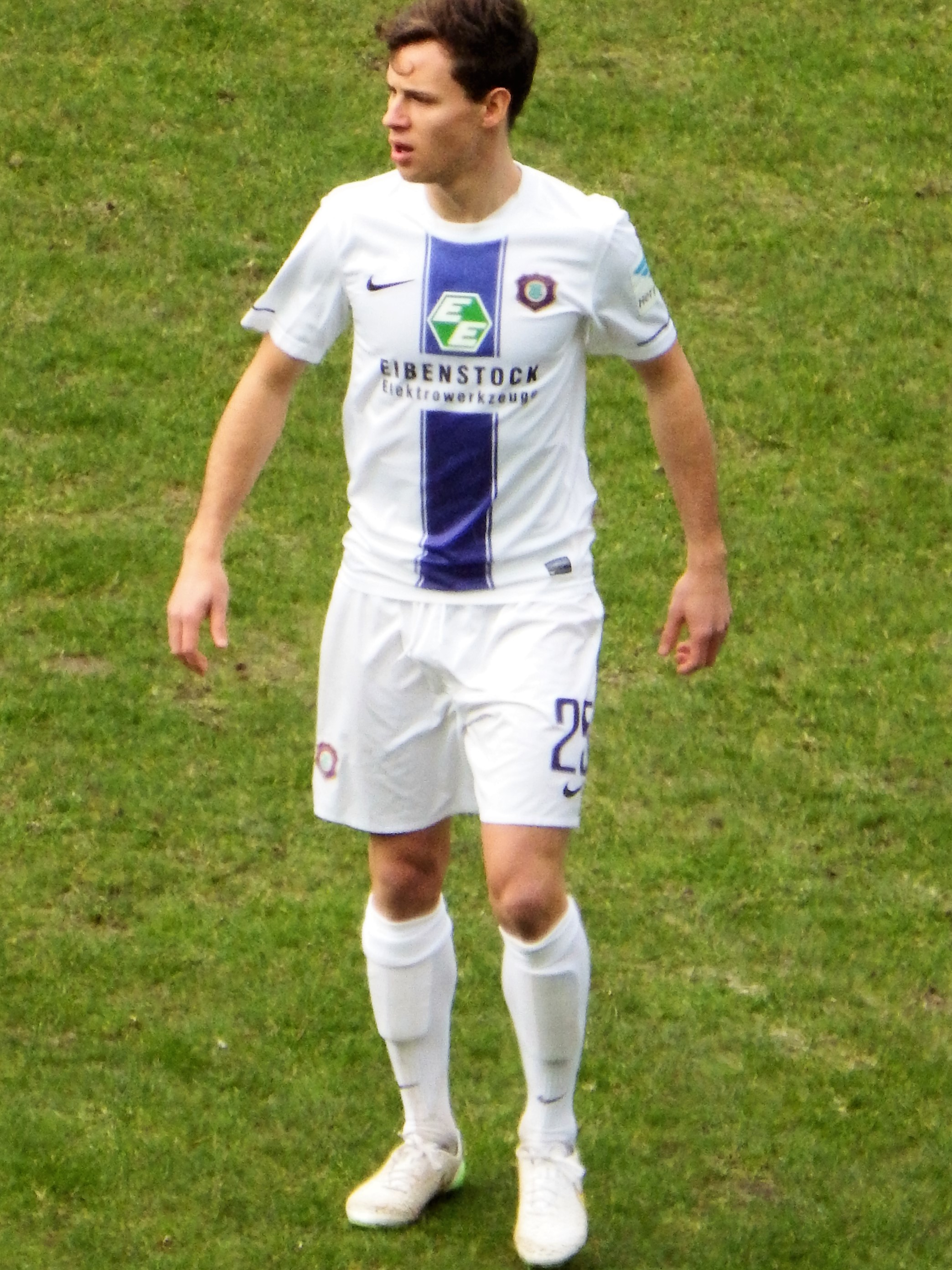 Clemens Fandrich, Aue